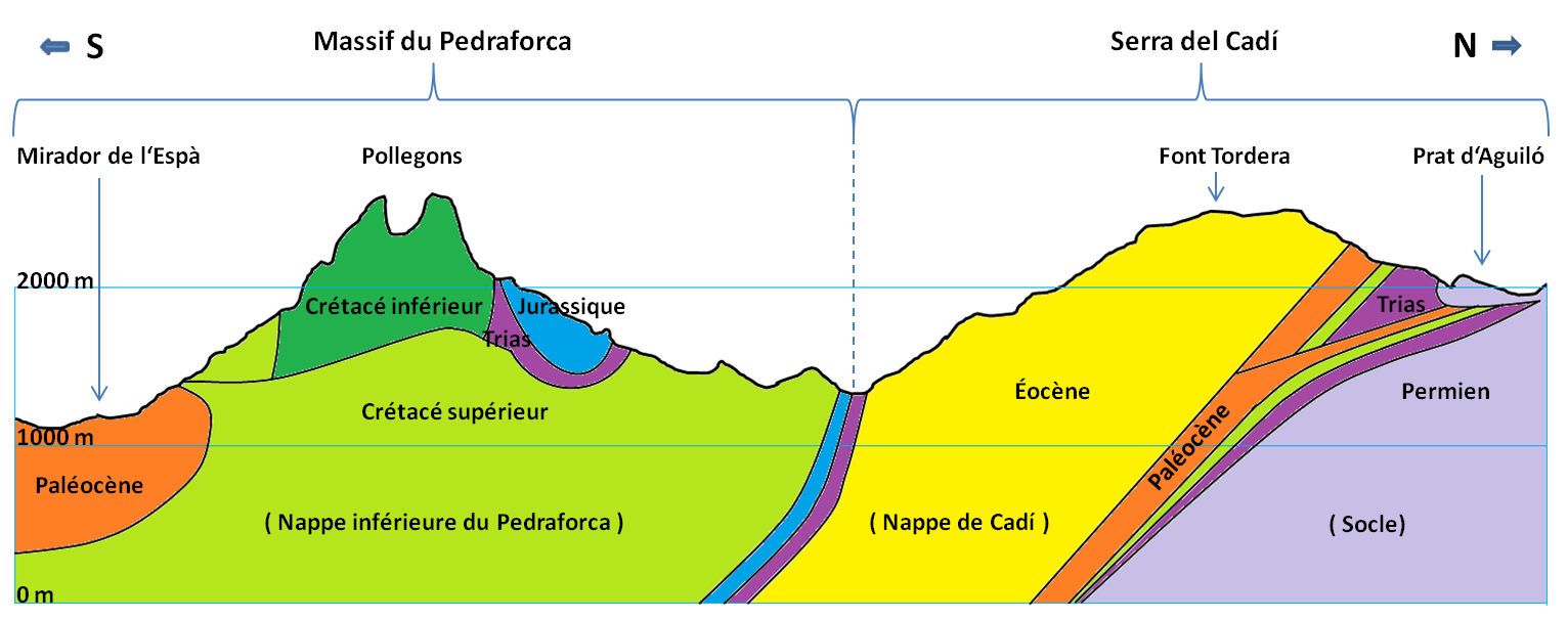 Coupe géologique simplifiée du Massif de Pedraforca et du Massif de Cadí : Gris = Permien Violet = Trias Bleu = Jurassique Vert foncé = Crétacé inférieur Vert clair = Crétacé supérieur Orange foncé = Paléocène Jaune = Éocène